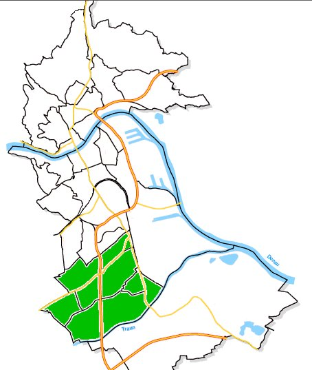 Städtische Bezirke Linz - Kleinmünchen hervorgehoben. Selbst gezeichnet auf Grundlage von: "Stadtforschung Linz: Linz 2000. Fakten, Bilder, Grafiken." (der greg:) 30.5.2005 - Lizenz: CC-BY